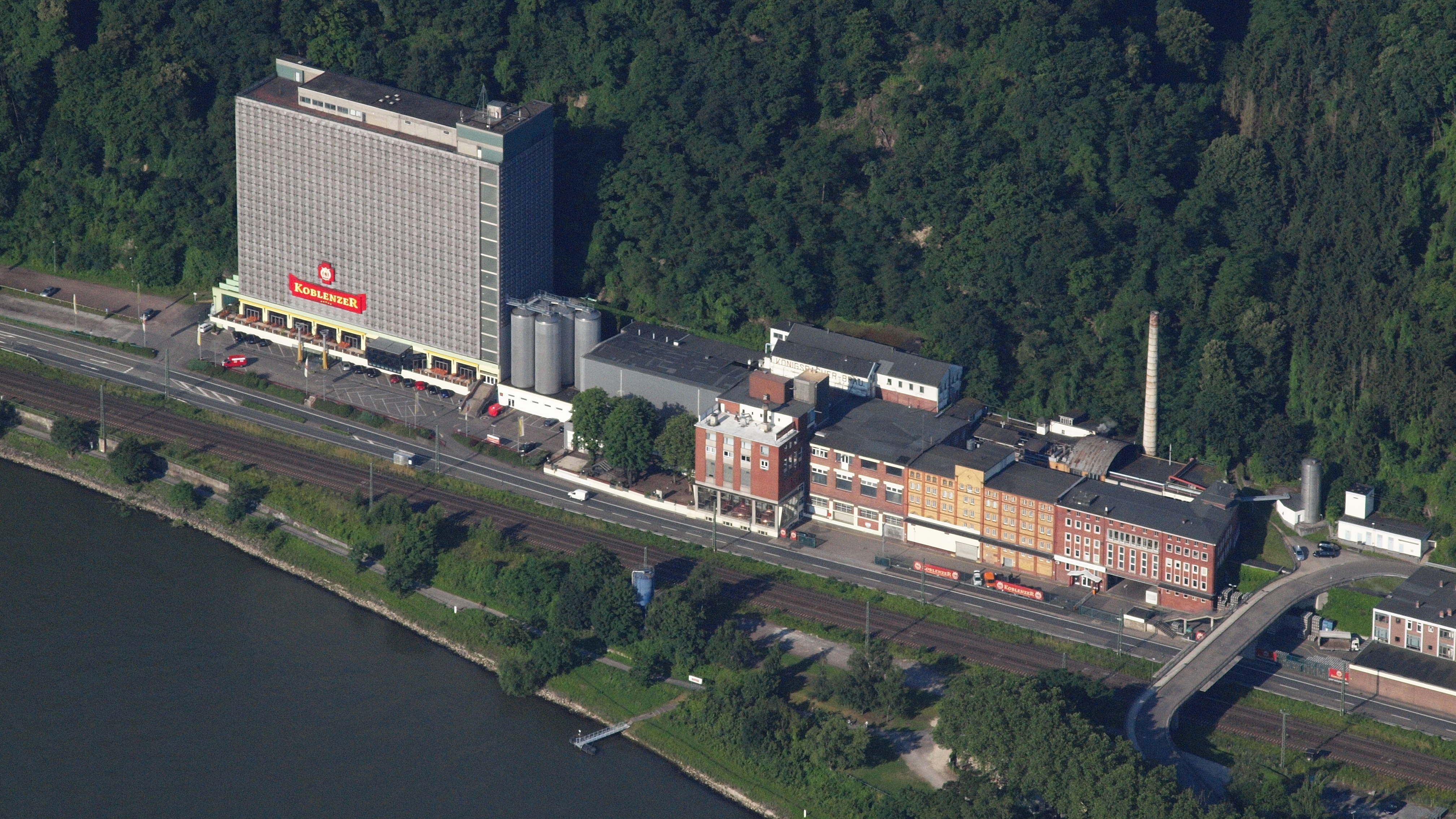 Koblenzer Brauerei: Luftaufnahme aus östlicher Richtung